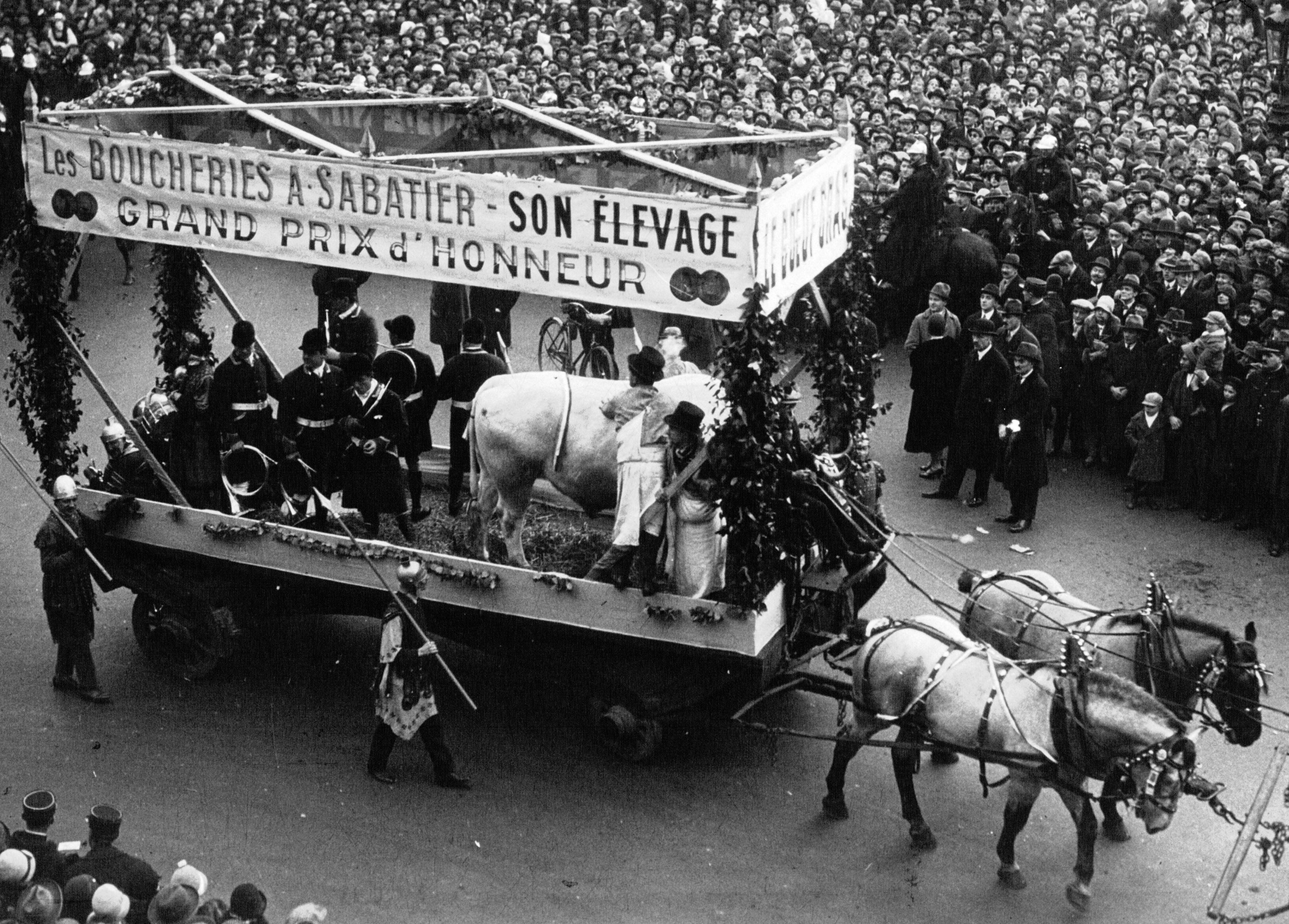 Char réclame des boucheries Auguste Sabatier portant le traditionnel Bœuf Gras parisien dans le cortège de la Mi-Carême à Paris 1928.